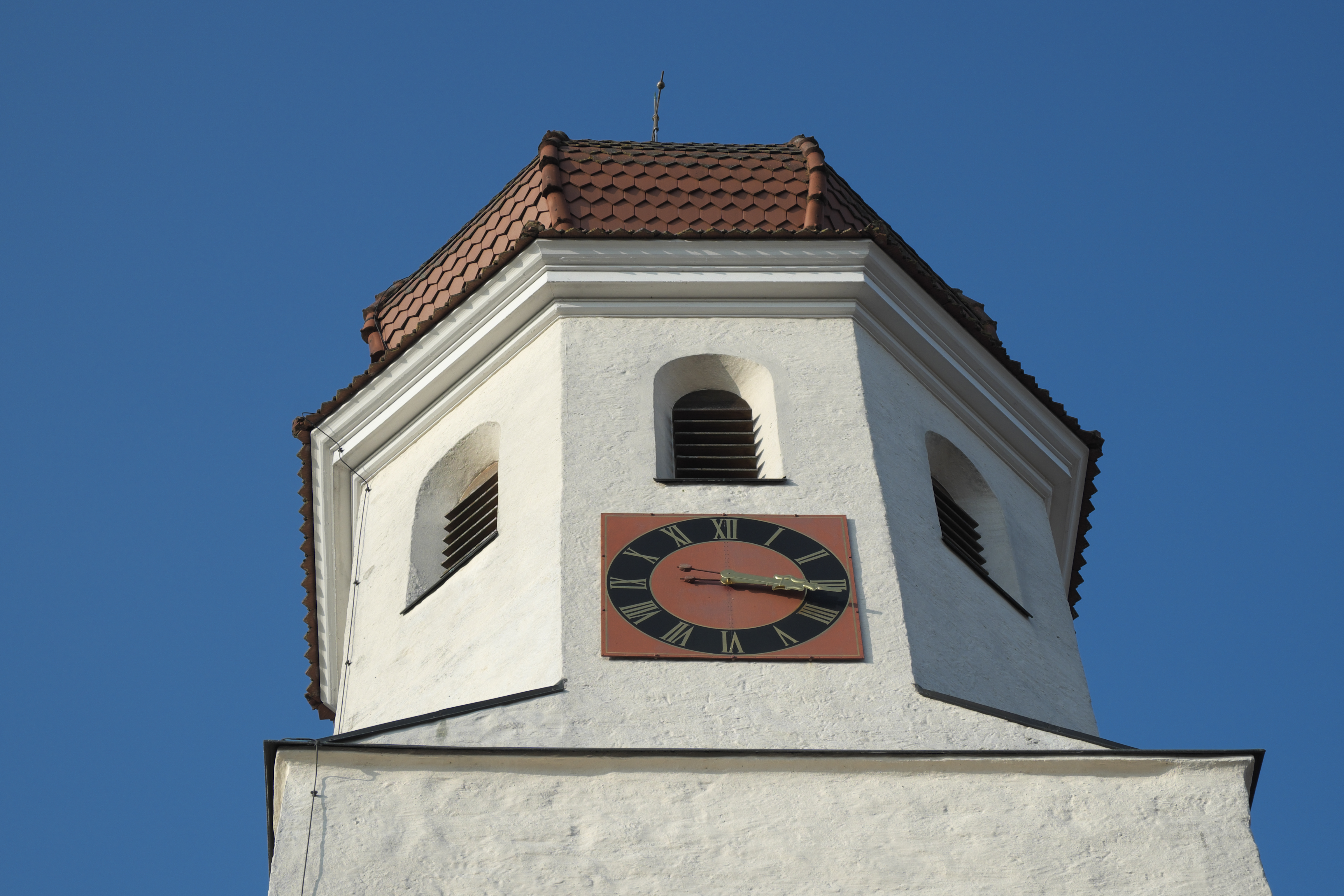 Katholische Pfarrkirche St. Petrus und Paulus in Halsbach, einem Ortsteil von Dürrwangen im Landkreis Ansbach (Mittelfranken/Bayern), Kirchturm